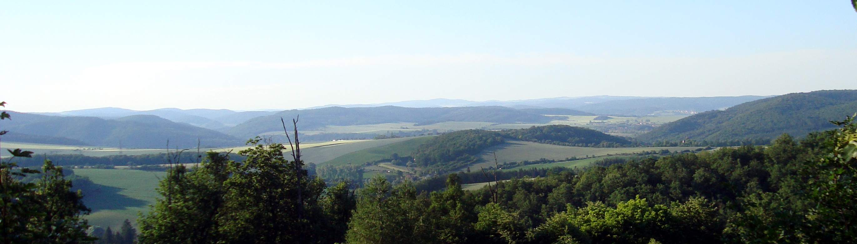 Výhled z Podkomorských lesů na Boskovickou brázdu a na obzoru na Křižanovskou vrchovinu